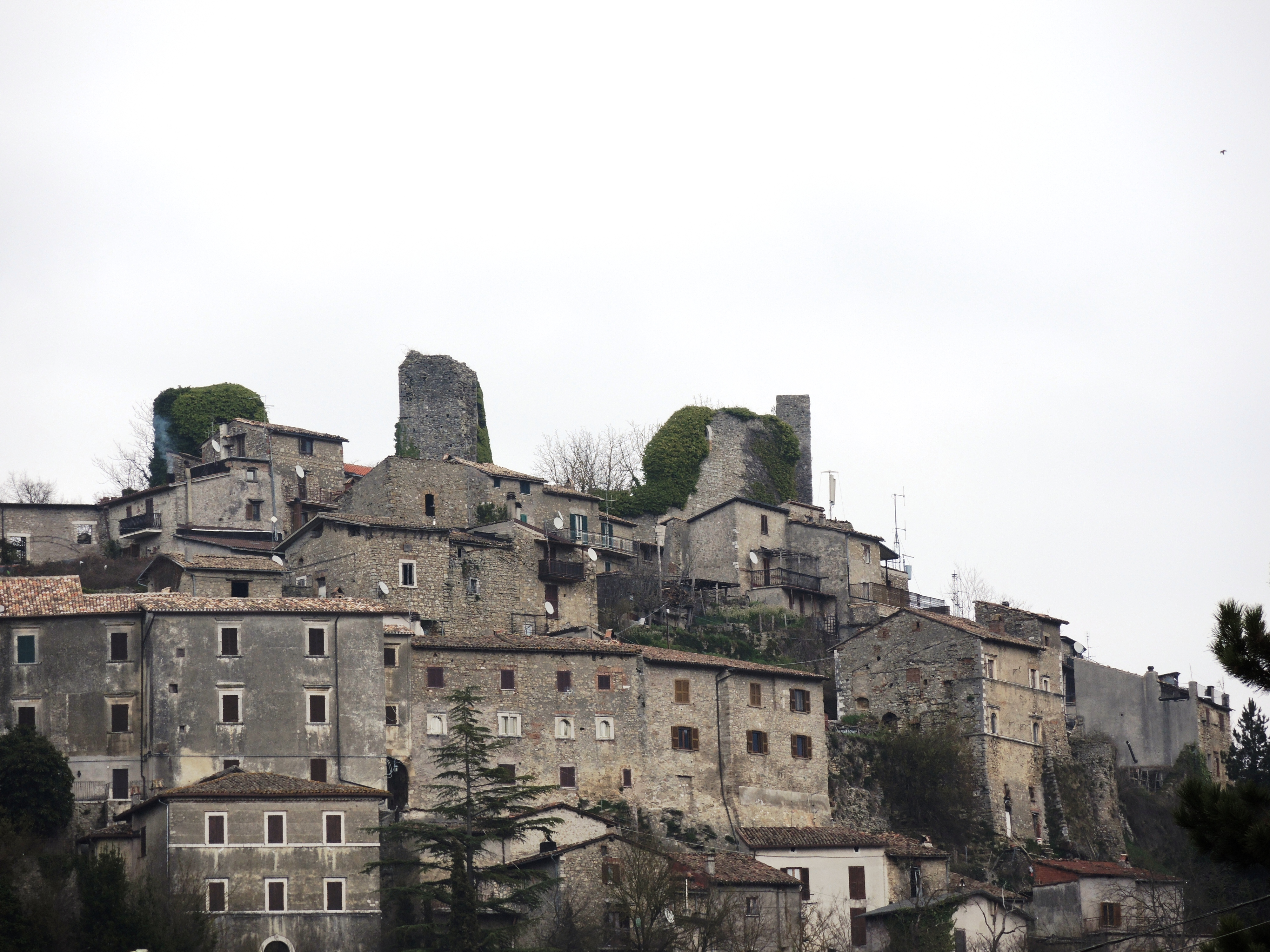 Castello di Carsoli